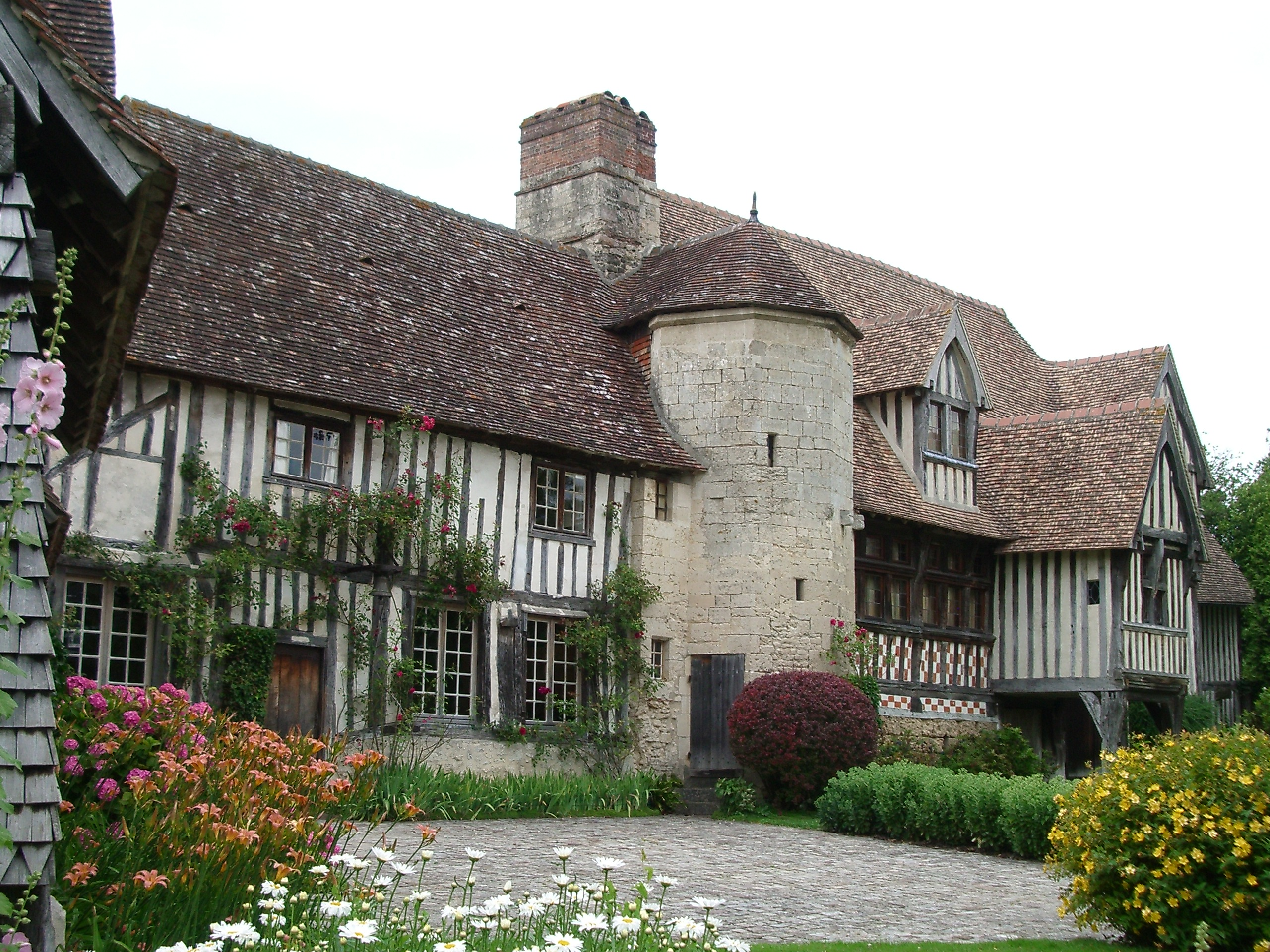 Manoir des évêques, à Canapville